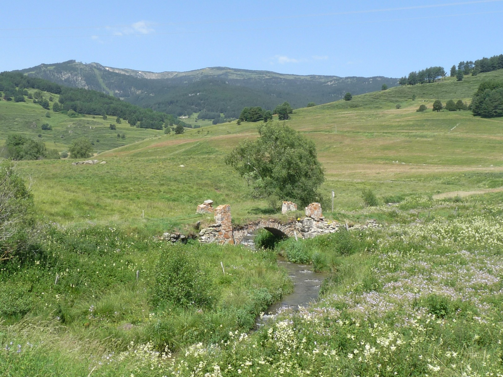 Pont de l'ancienne voie royale, limite Fontrabiouse-Puyvalador, Pyrénées-Orientales, France